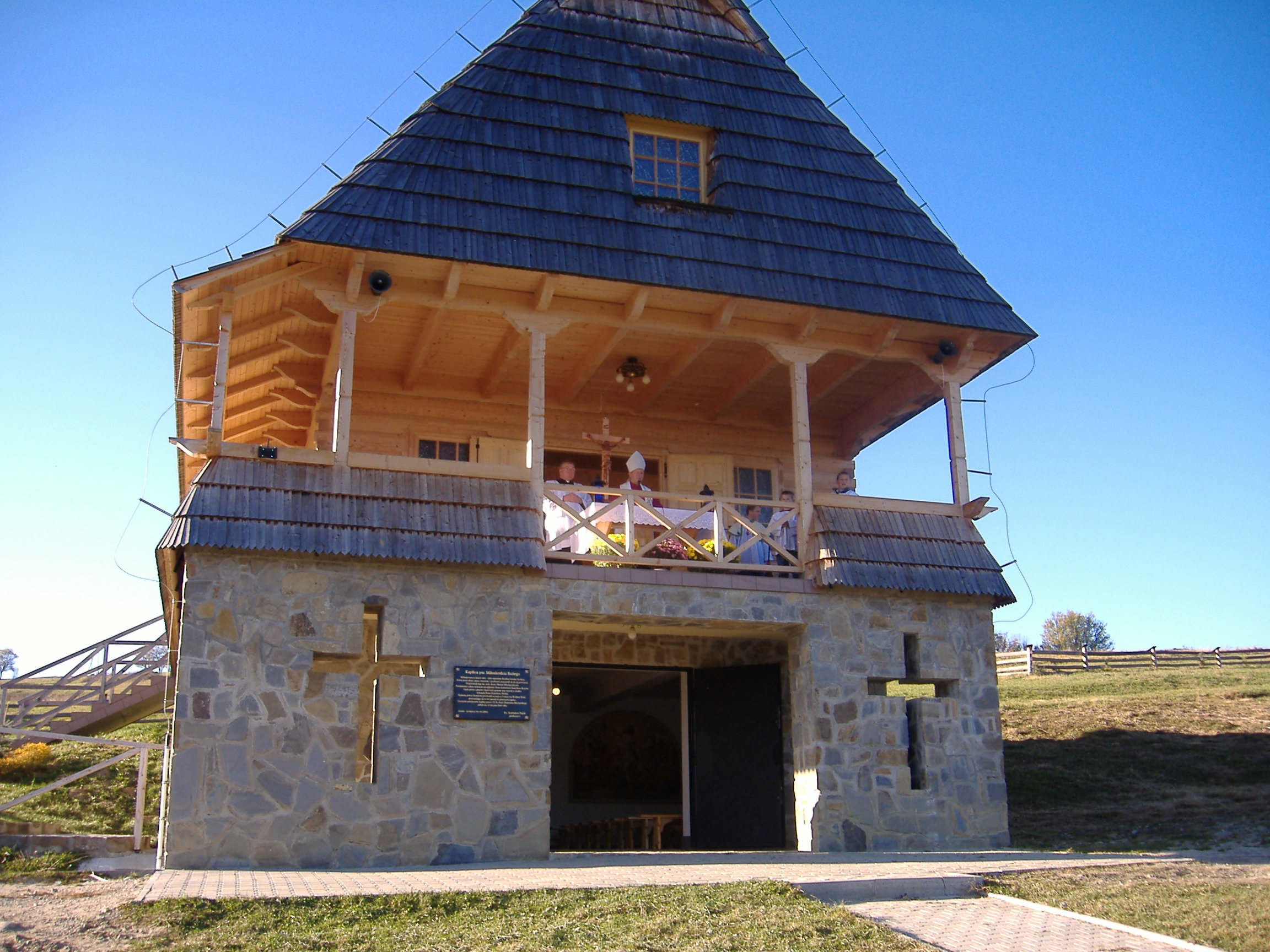 Kaplica cmentarna w Leśnicy